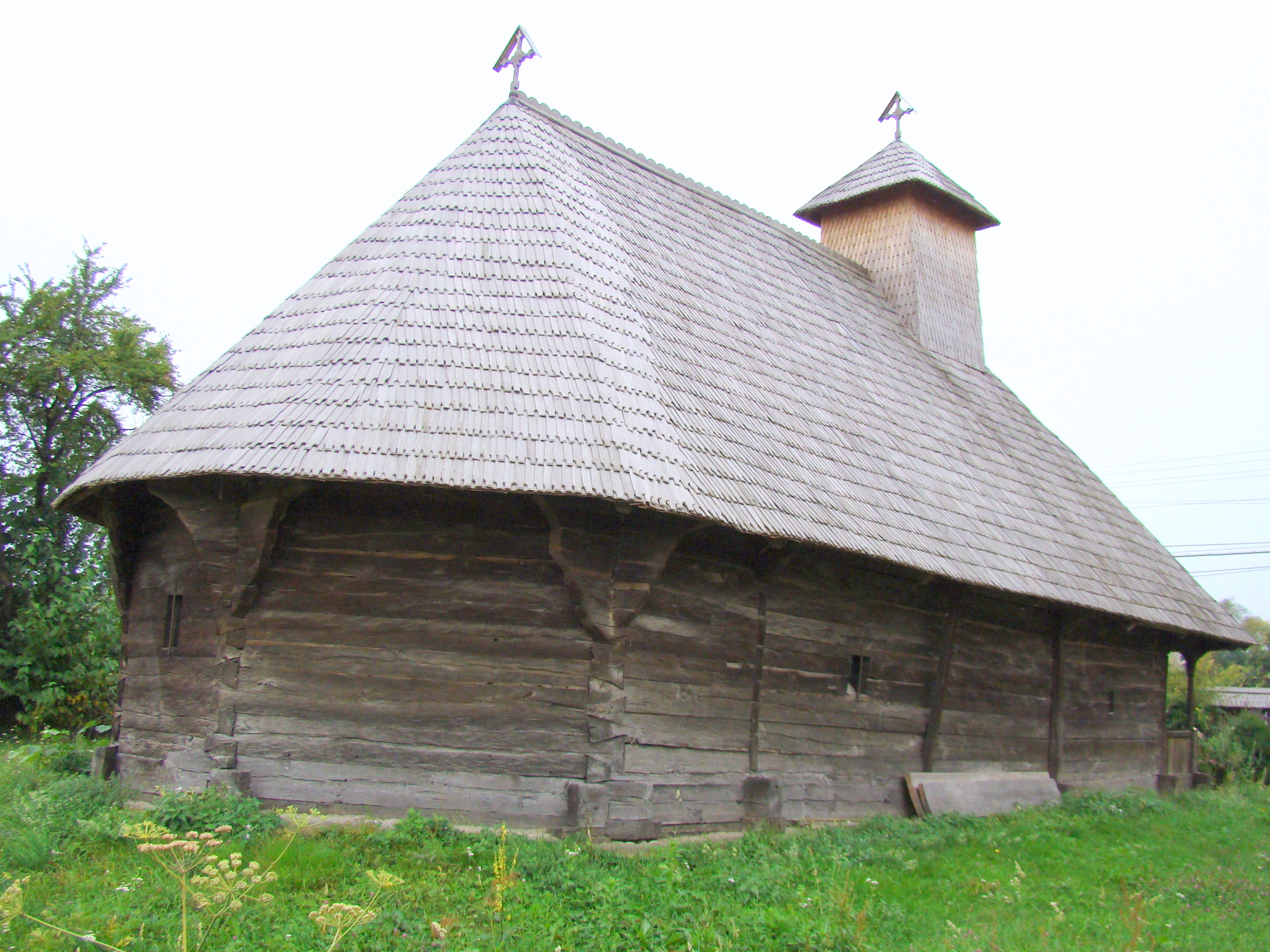 Biserica de lemn „Cuvioasa Paraschiva” din Peștișani, județul Gorj